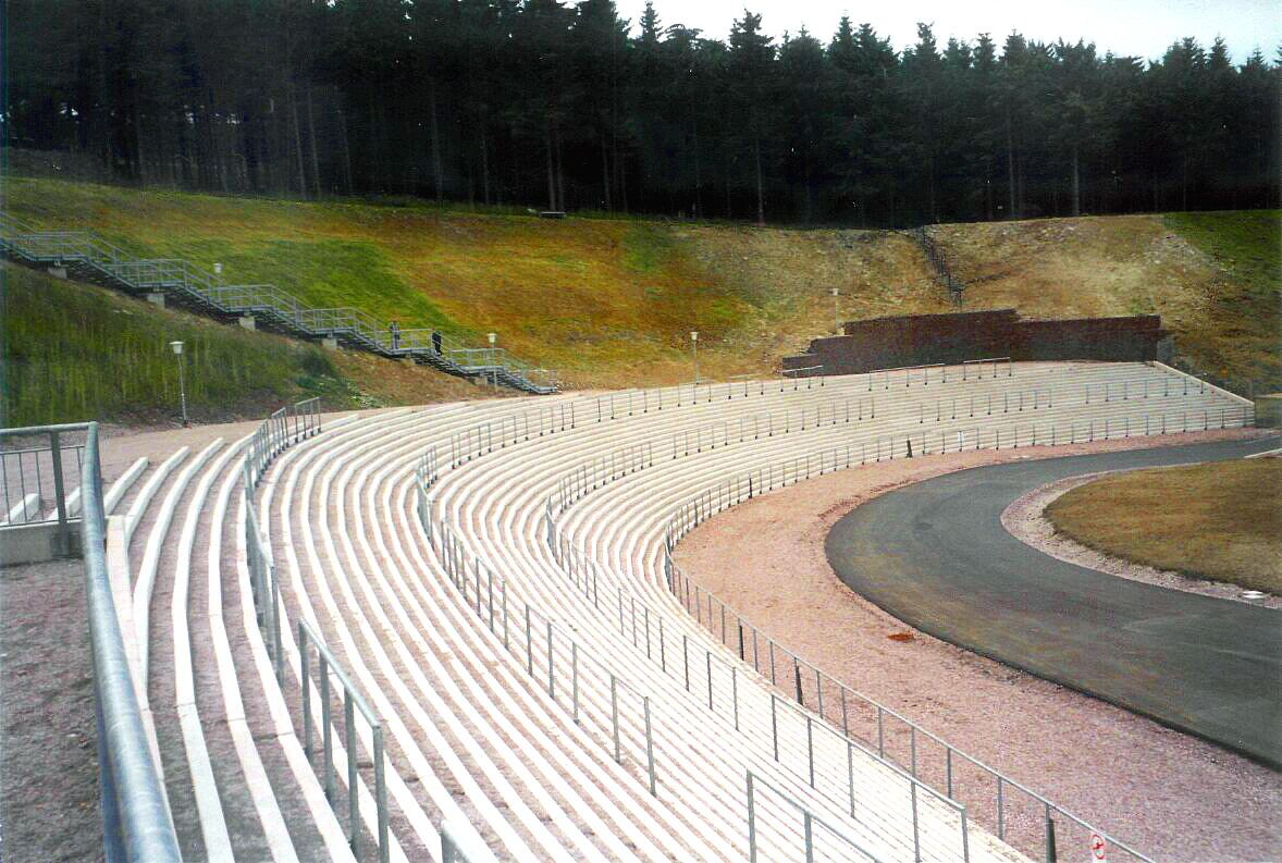 Oberhof, Rennsteig-Arena, 3